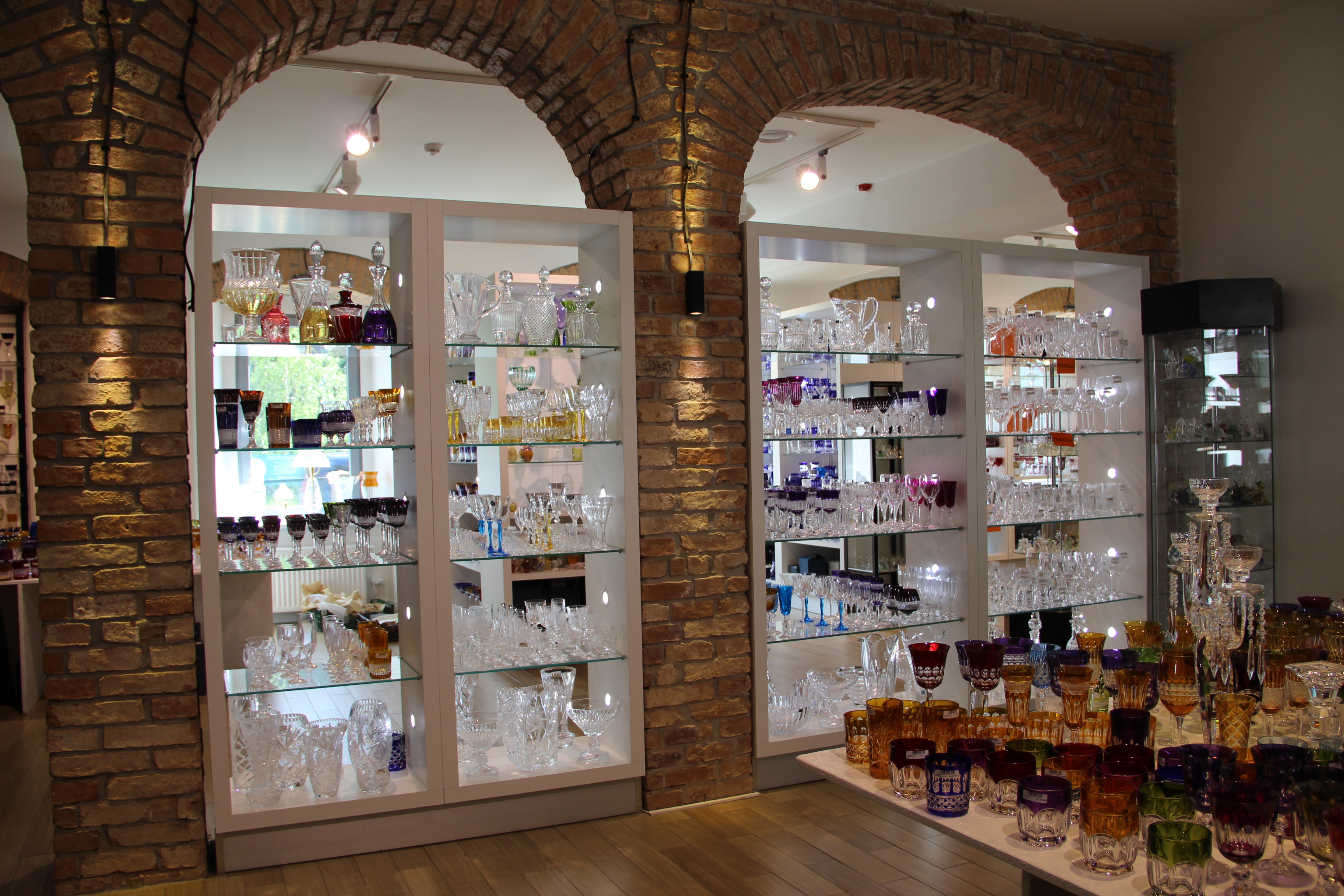 Piechowice - Huta Julia - Sklep Kolor